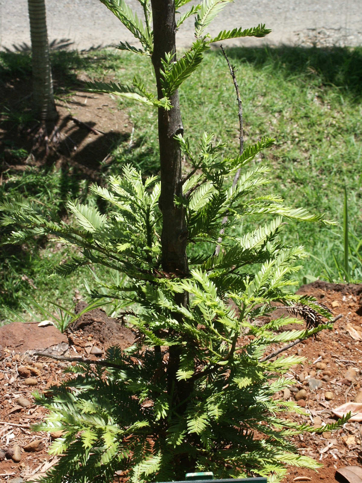 Retrophyllum comptonii (jeune). Parc forestier de Nouméa - Nouvelle-Calédonie